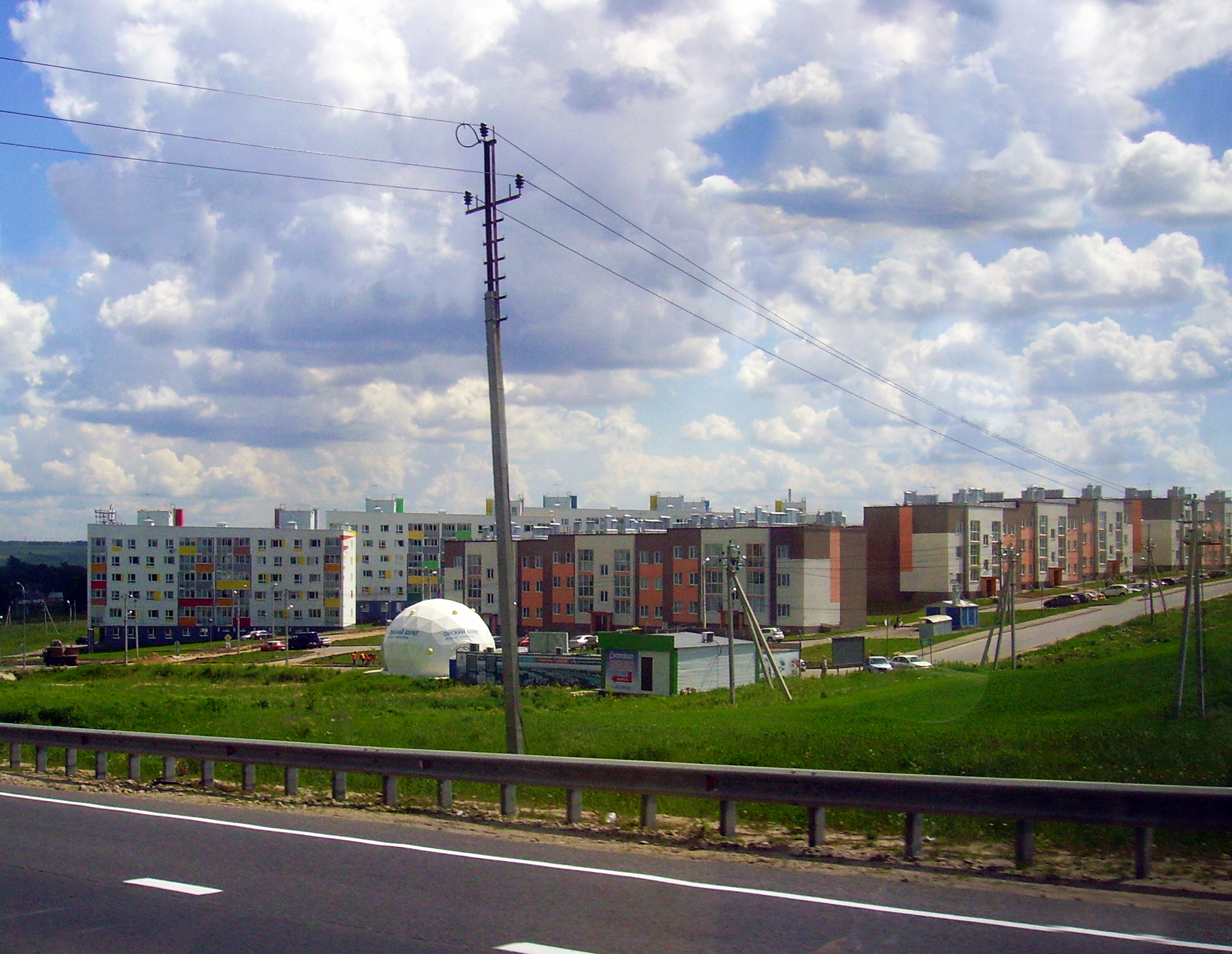 Нижний Новгород. Вид на жилой комплекс «Окский Берег» в посёлке Новинки.